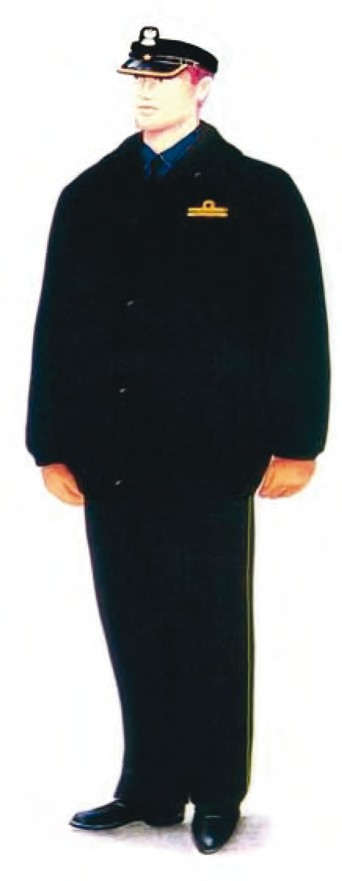 Ubiór służbowy SG funkcjonariuszy noszących umundurowanie MW z kurtką nieprzemakalną czarną i czapką garnizonową.